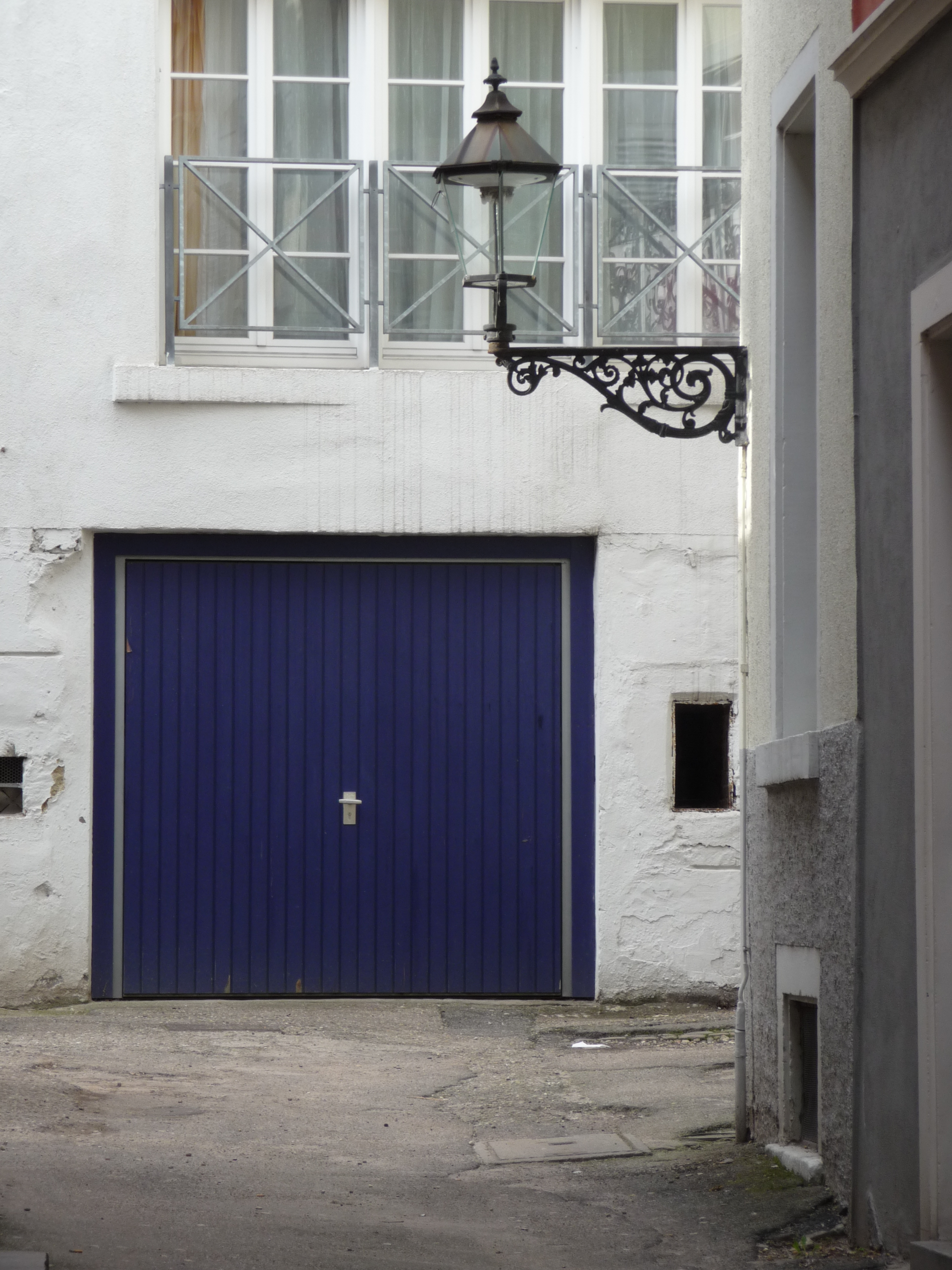 Blaues Garagentor (Schwingtor) in einem Hinterhof in der Innenstadt von Baden-Baden